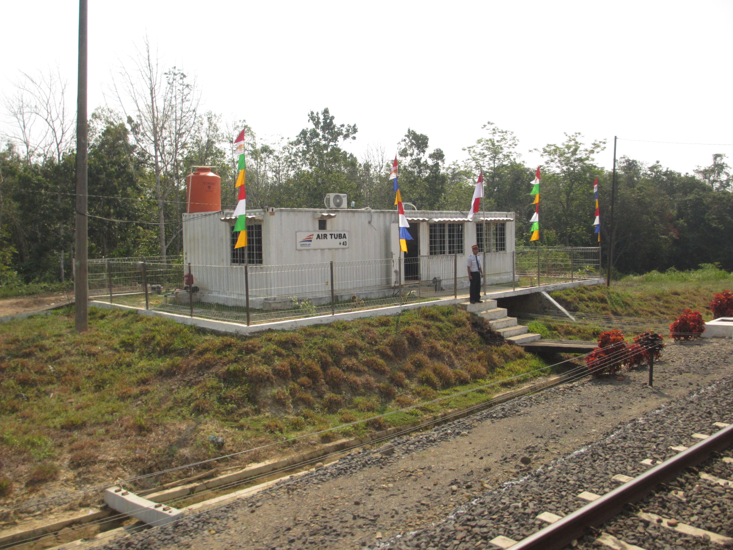 Stasiun Airtuba.